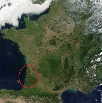 Localisation des Landes de Gascogne en France